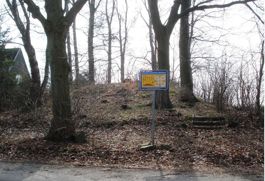 Grabhuegel Hoegersdorf-Rotenhahn